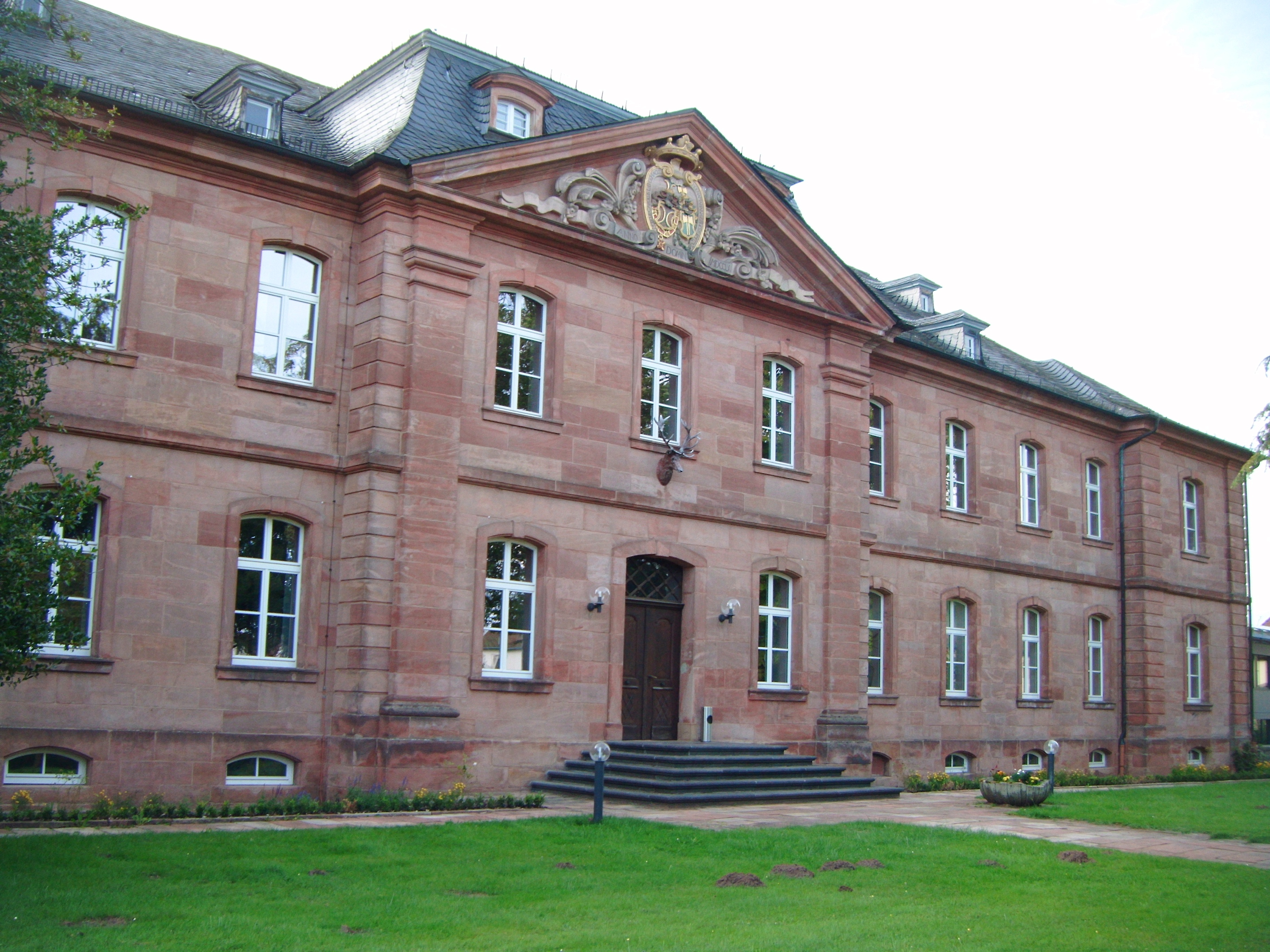 Schloss Trippstadt, Frontseite